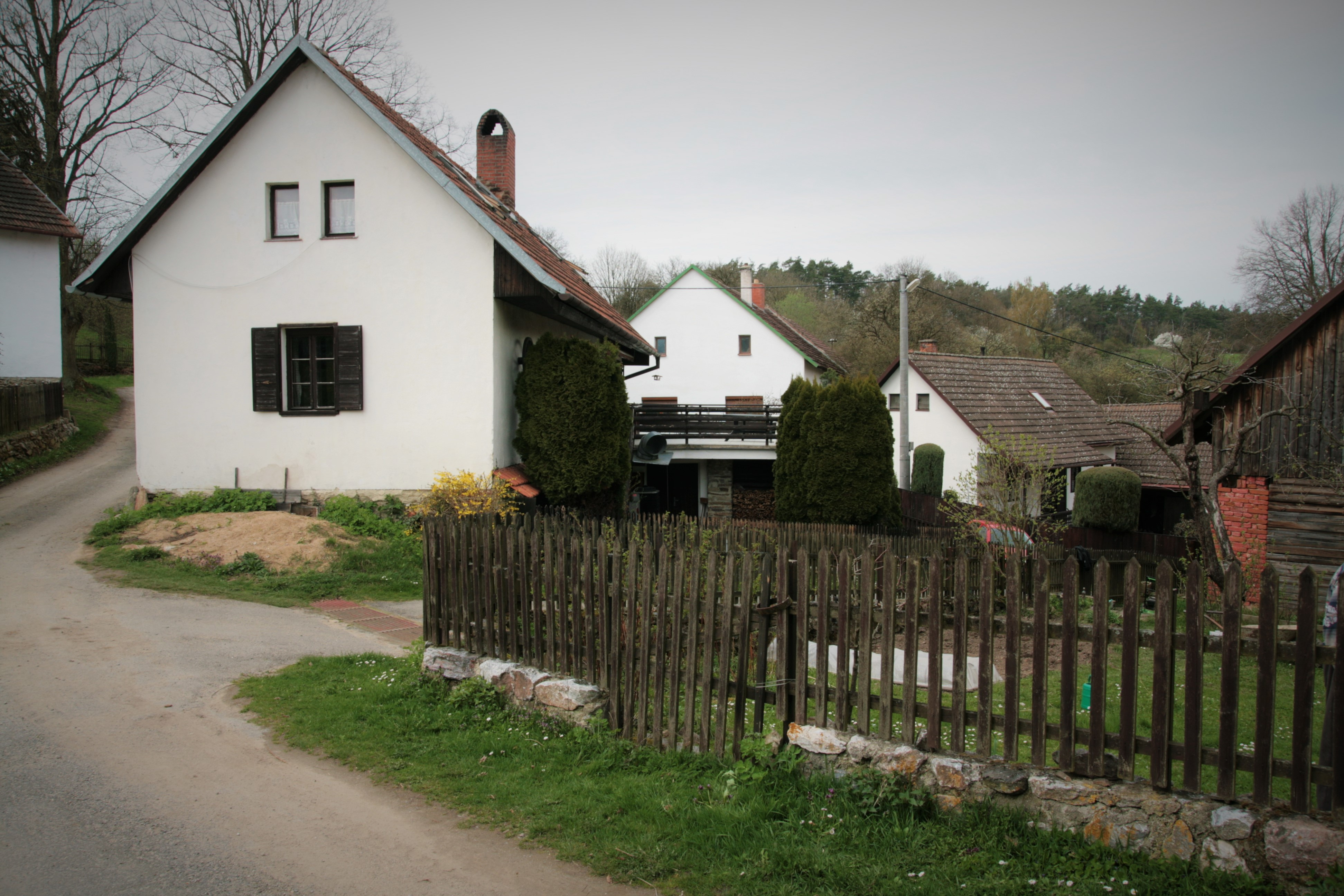 Vesnice Husle, část obce Pernštejnské Jestřebí, okres Brno-venkov.